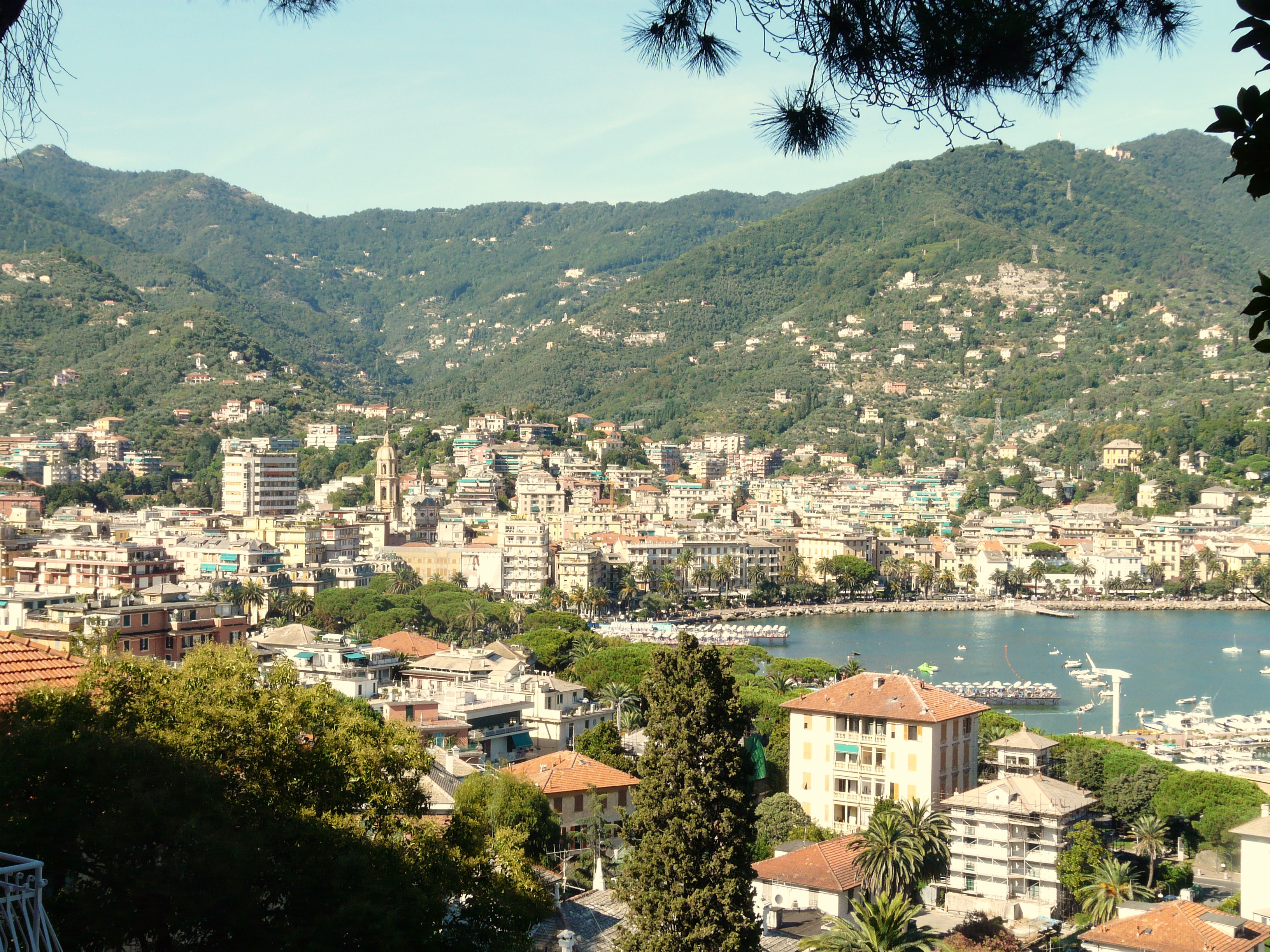 Panorama estivo di Rapallo, Liguria, Italia